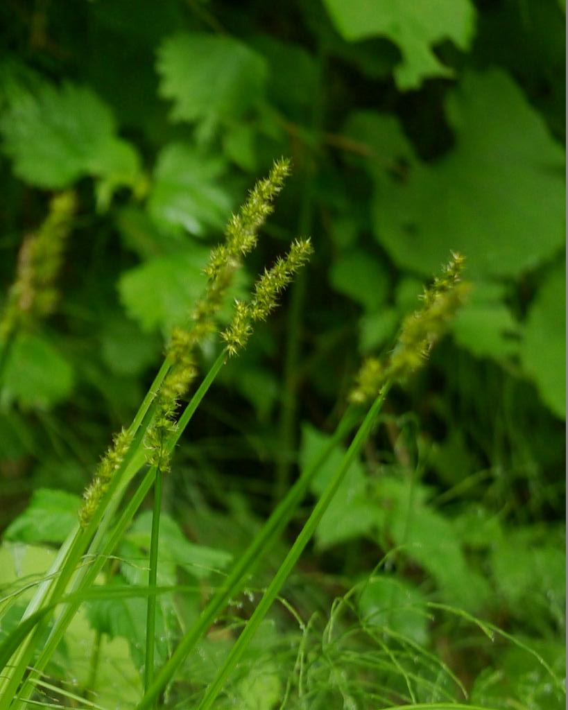 Carex stipata：オオカワズスゲ 2018/06/10 長野県・戸隠／Togakushi, Nagano Pref., Japan